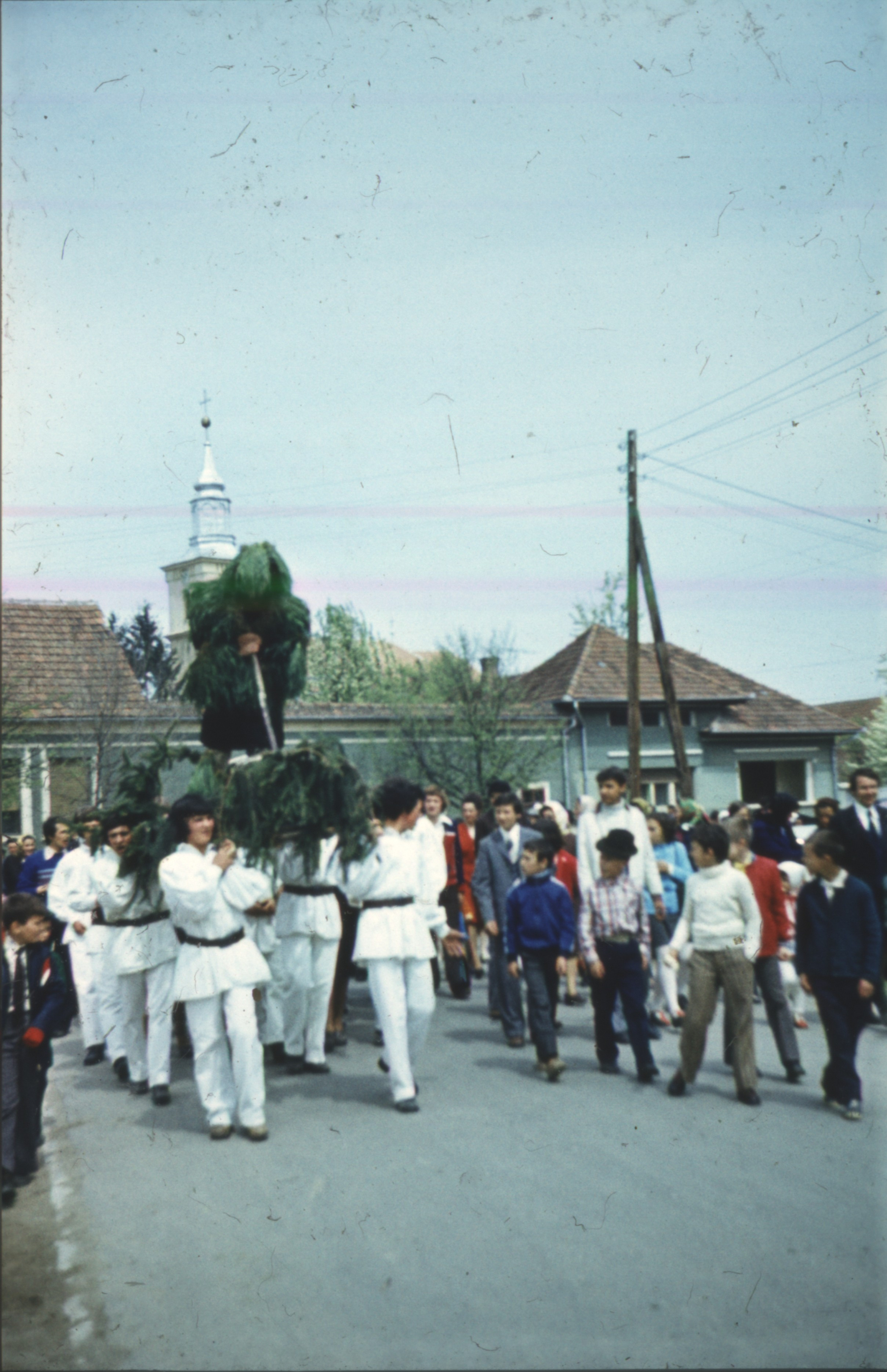 Plugarul, obicei de primăvară din satul Vad, jud. Brașov. Fotografie din mai 1978